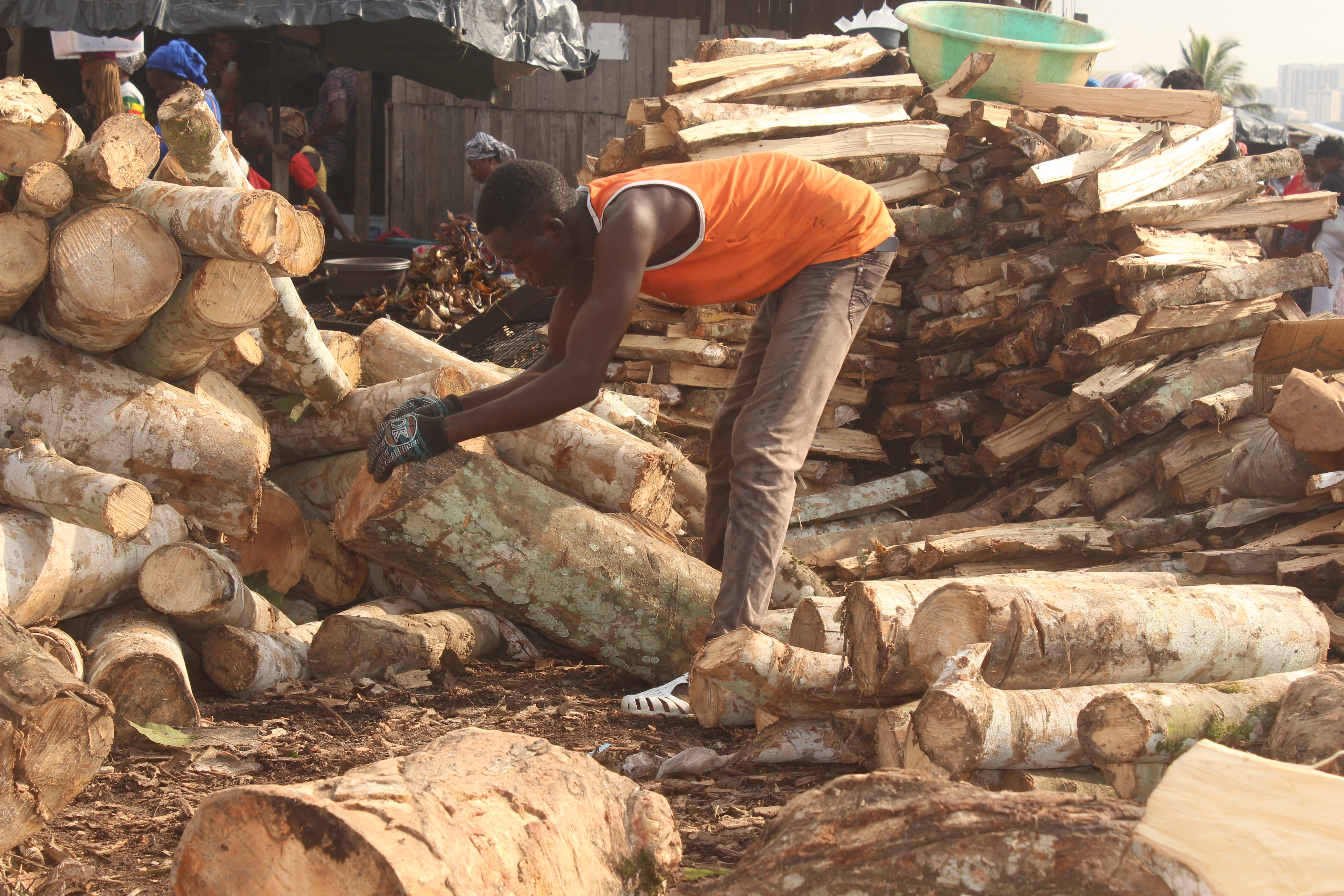 un casseur de bois avec une hache à Abidjan Abobodoumé This is an image of "African people at work" from Ivory Coast